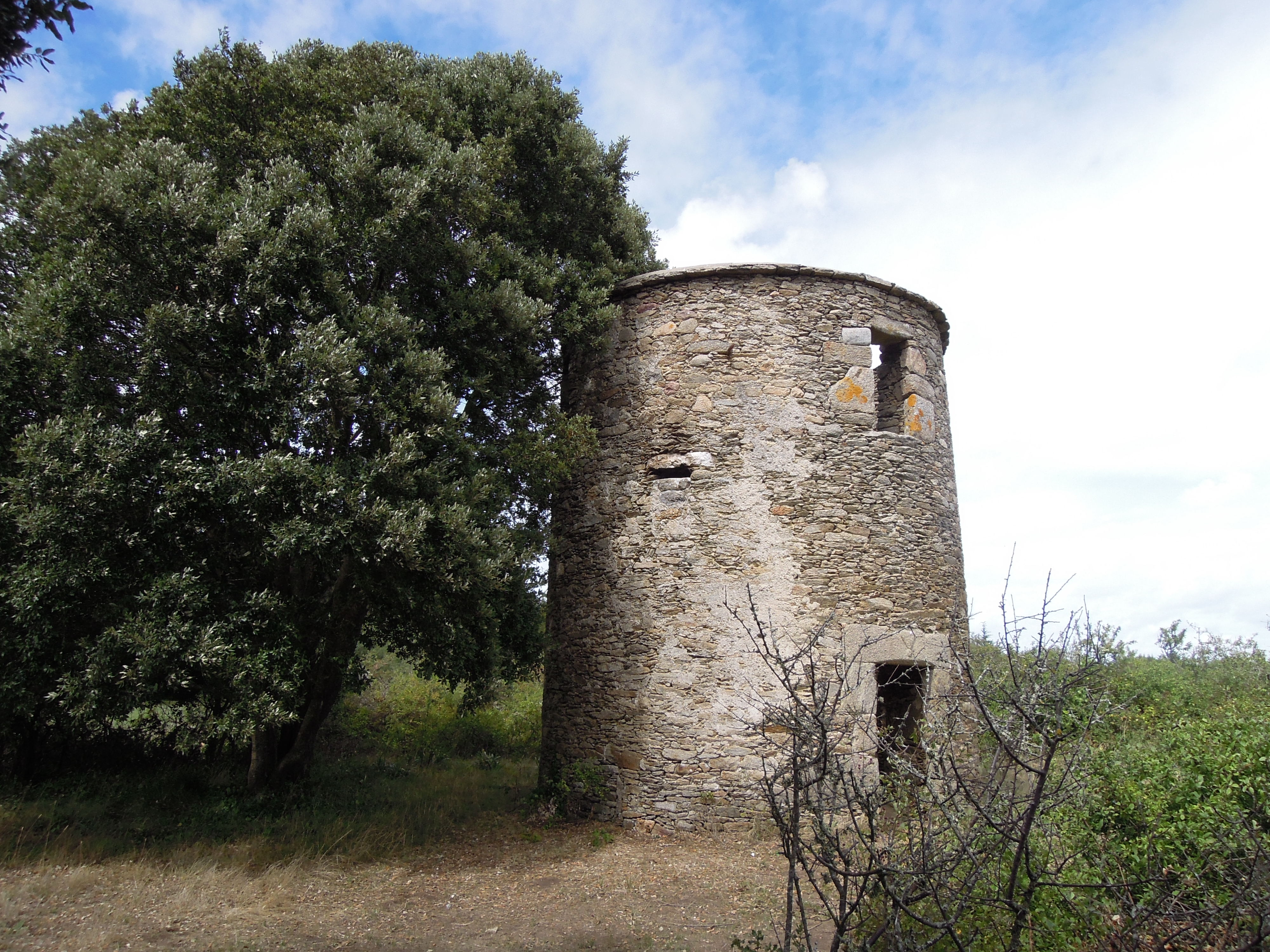 Moulin du Grand Chemin de l'ile d'Yeu